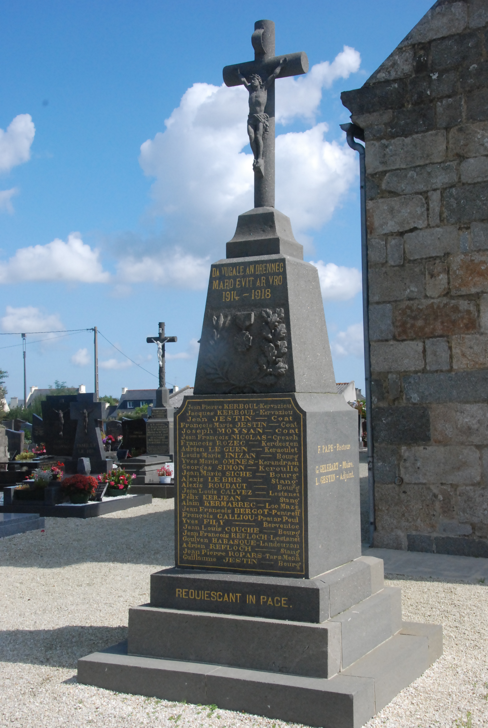 Monument aux morts - Le_Drennec-29